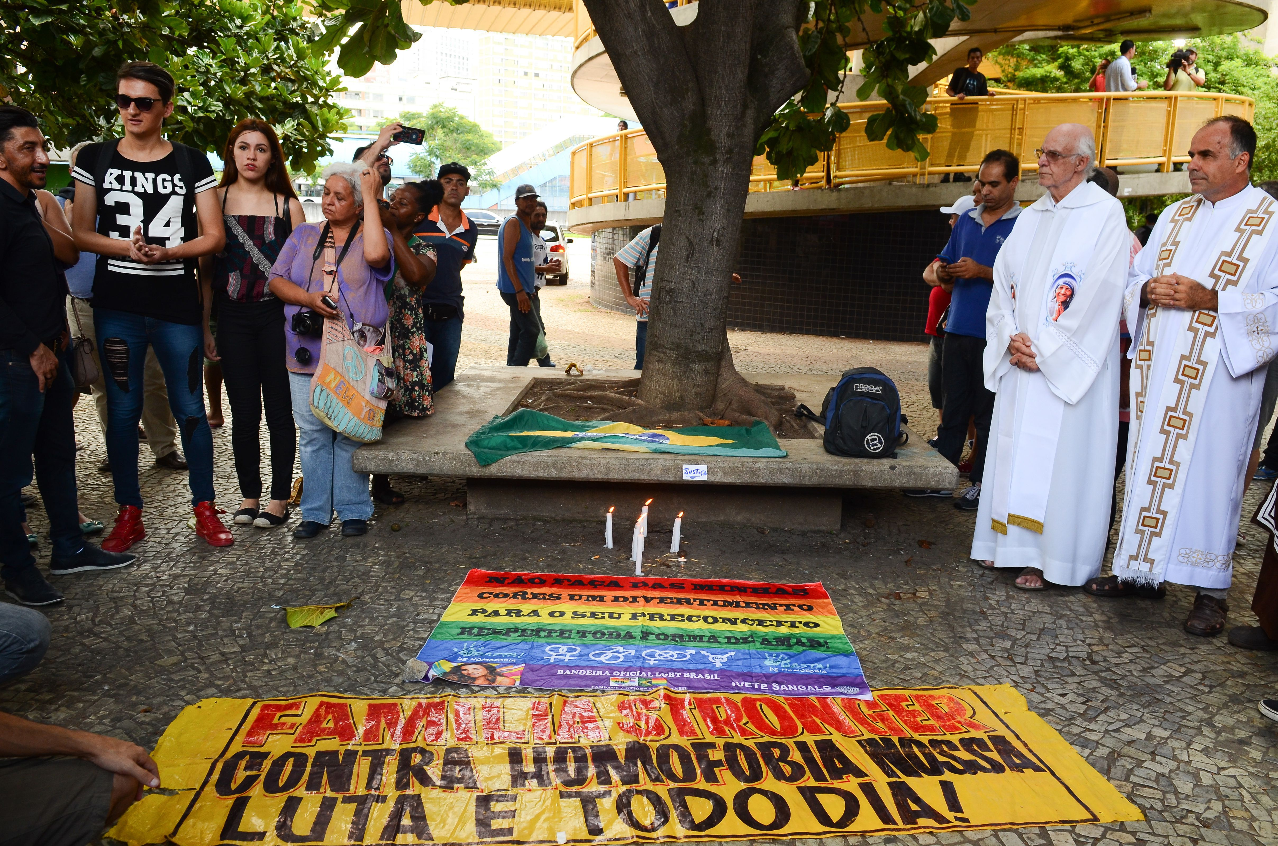 Ato público pede justiça para morte no metrô paulista